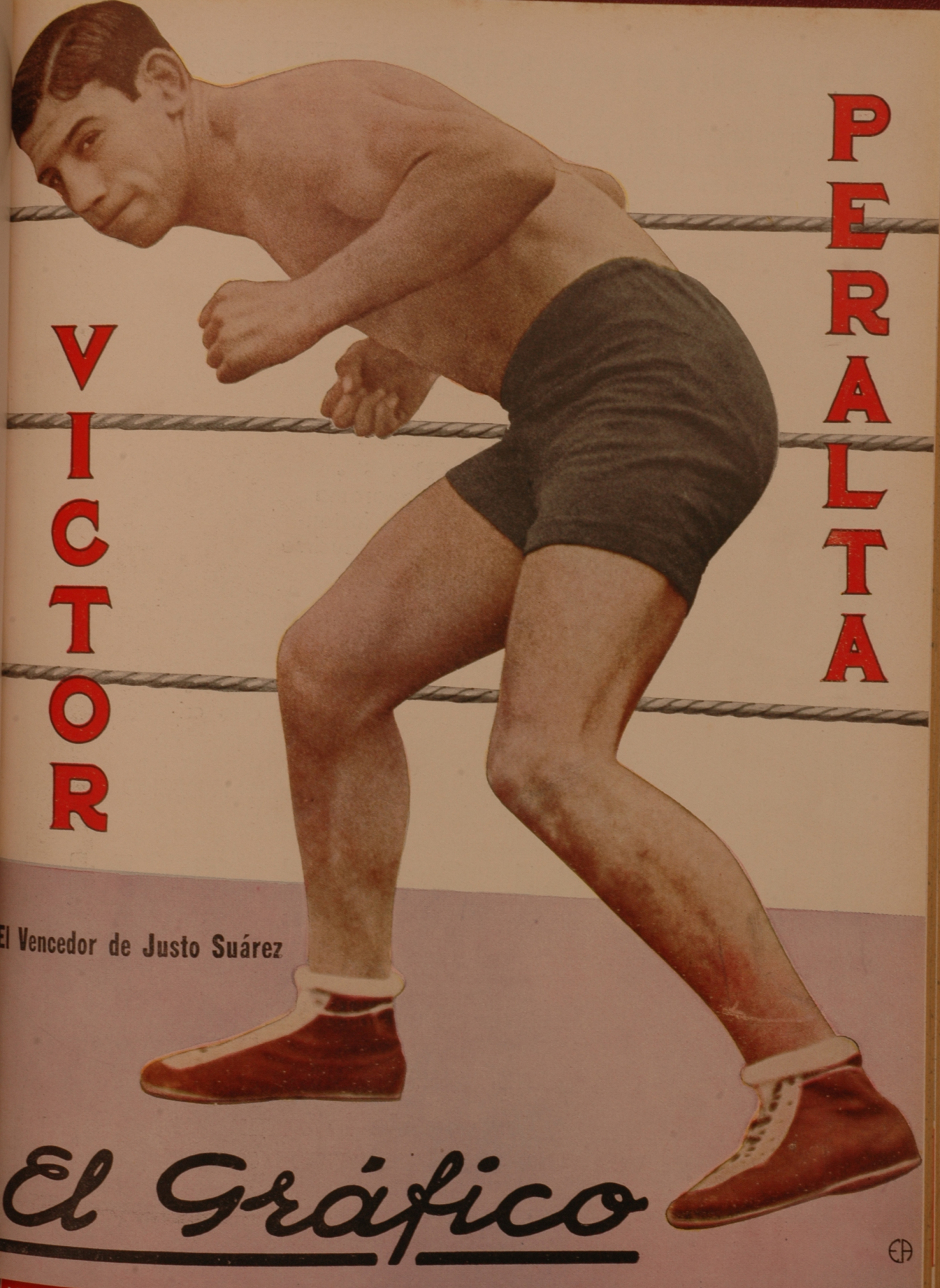 El Grafico del 26 de Marzo de 1932. Edicion 663